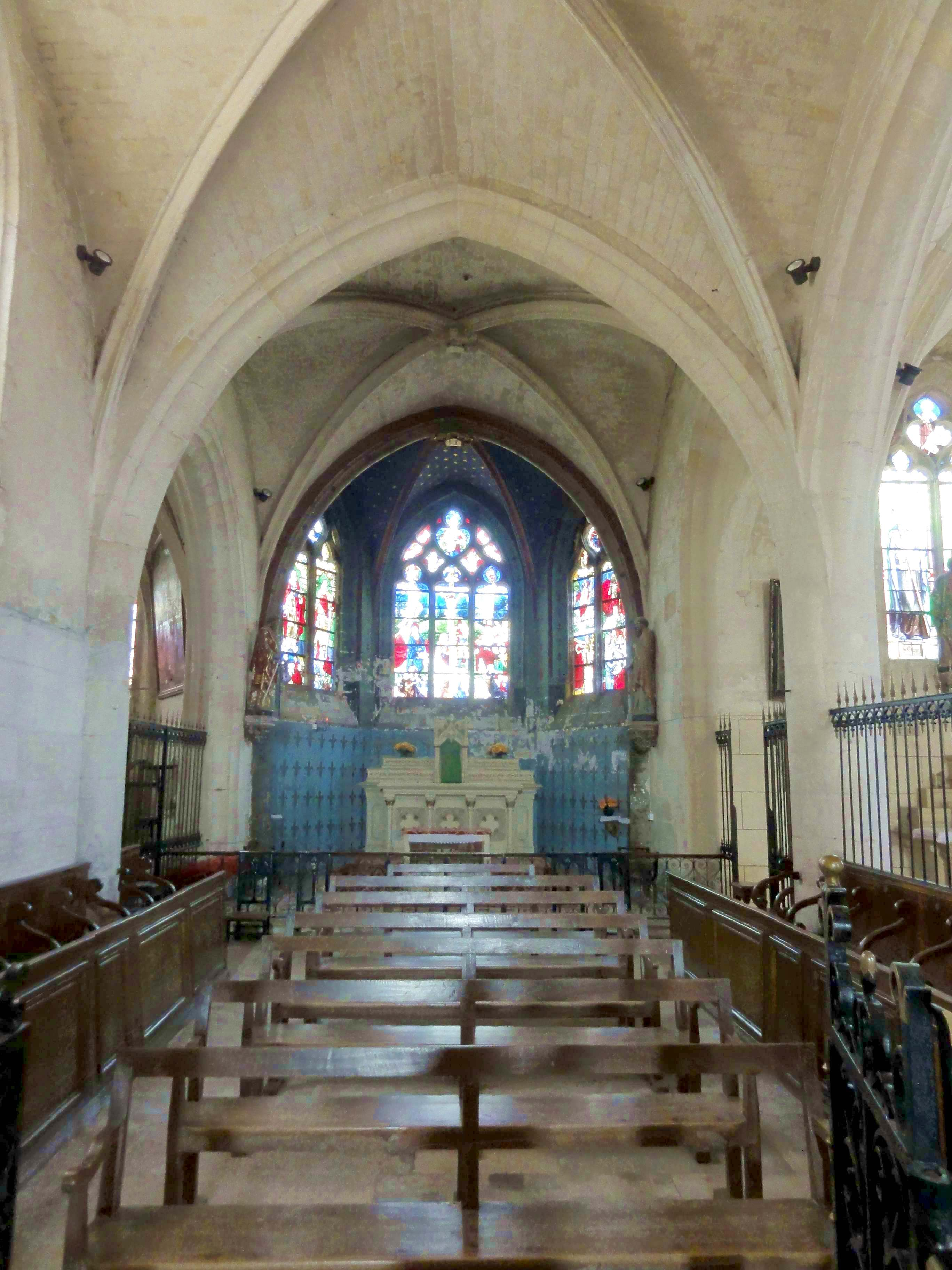 Intérieur de l'église (voir titre).